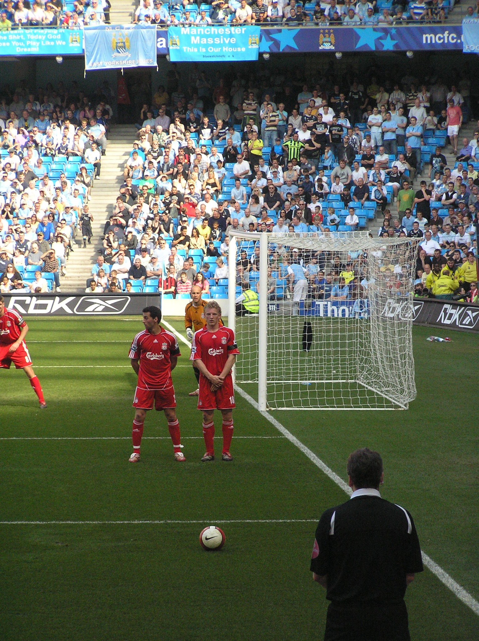 Free Kick